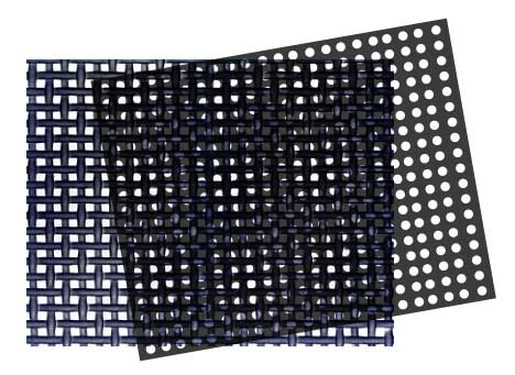 Siebdruckmoire